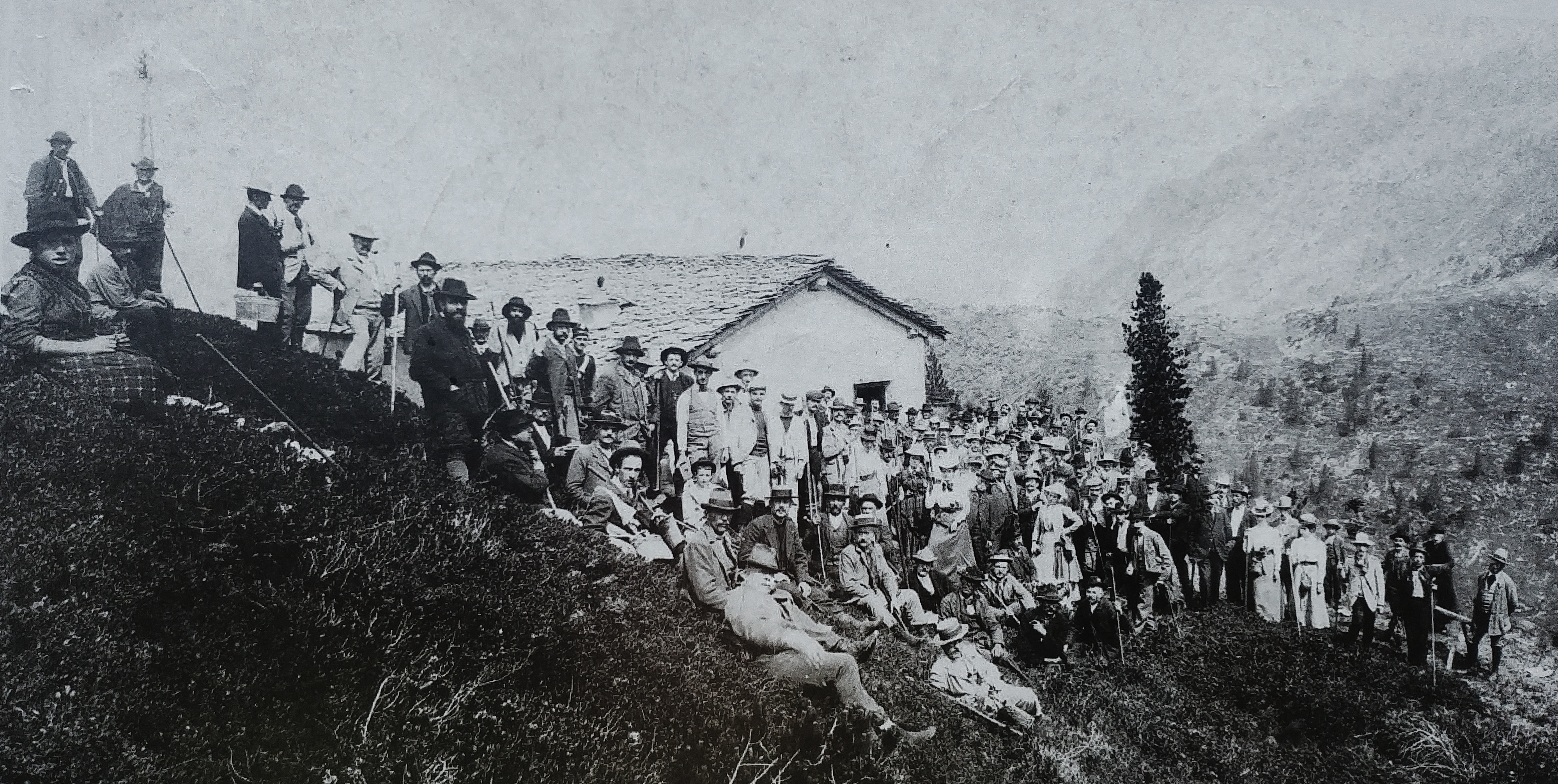 Foto d'epoca dell'inaugurazione del vecchio rifugio Laghi Gemelli (1900)